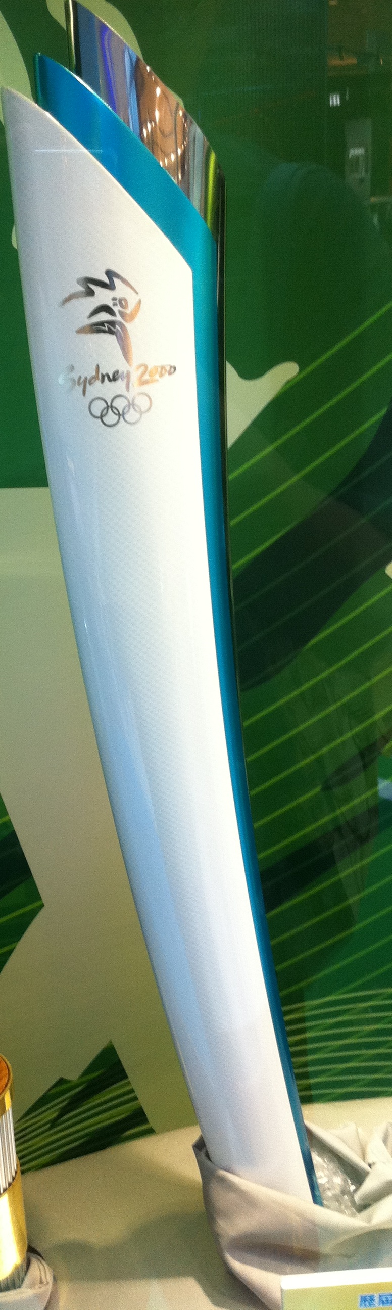 2000年夏季奧運火炬